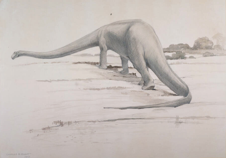 Diplodocus